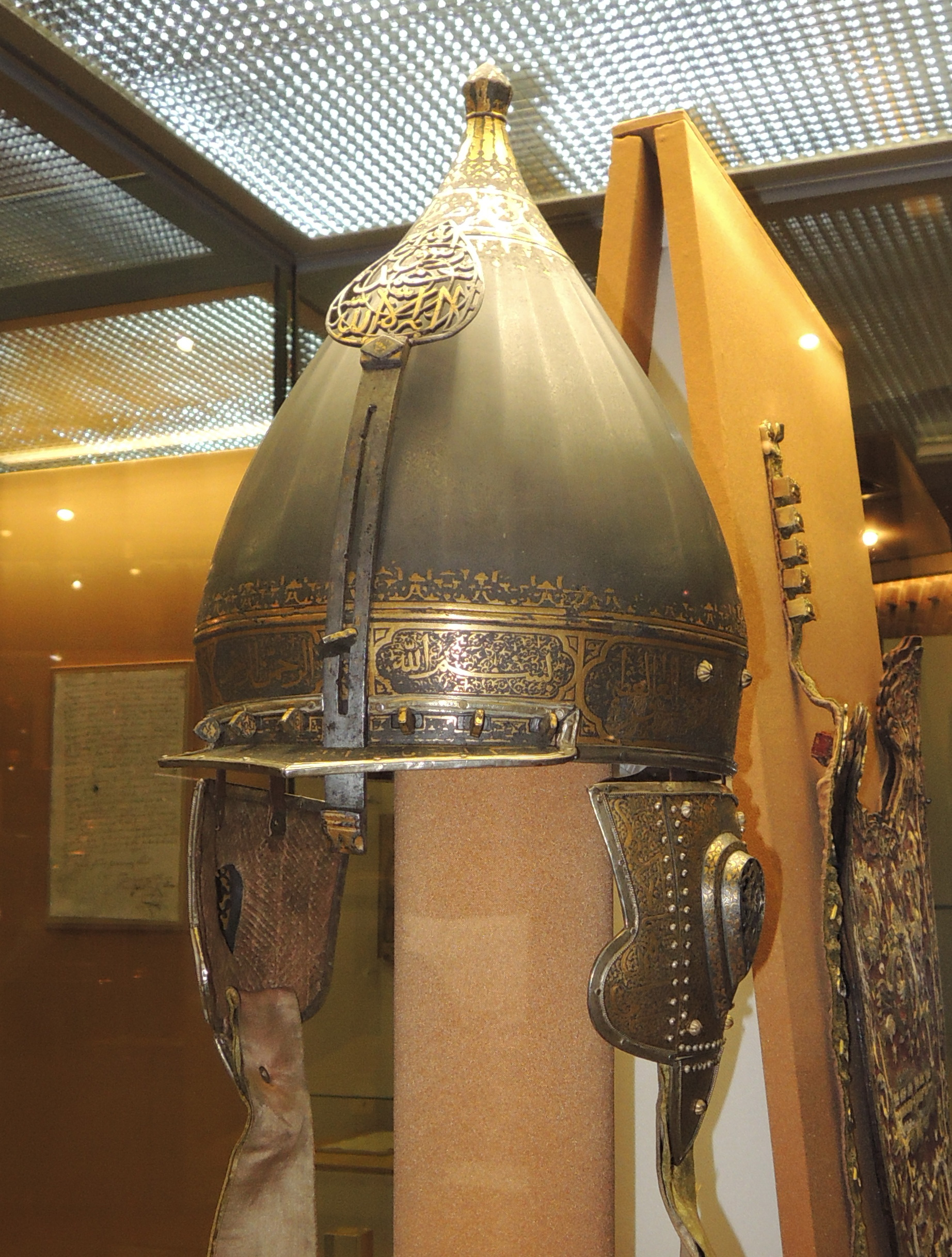 Шлем - "шапка ерихонская" царя Алексея МихайловичаHelmet - ("Cap of the Erykhon" by Tsar Alexei Mikhailovich)